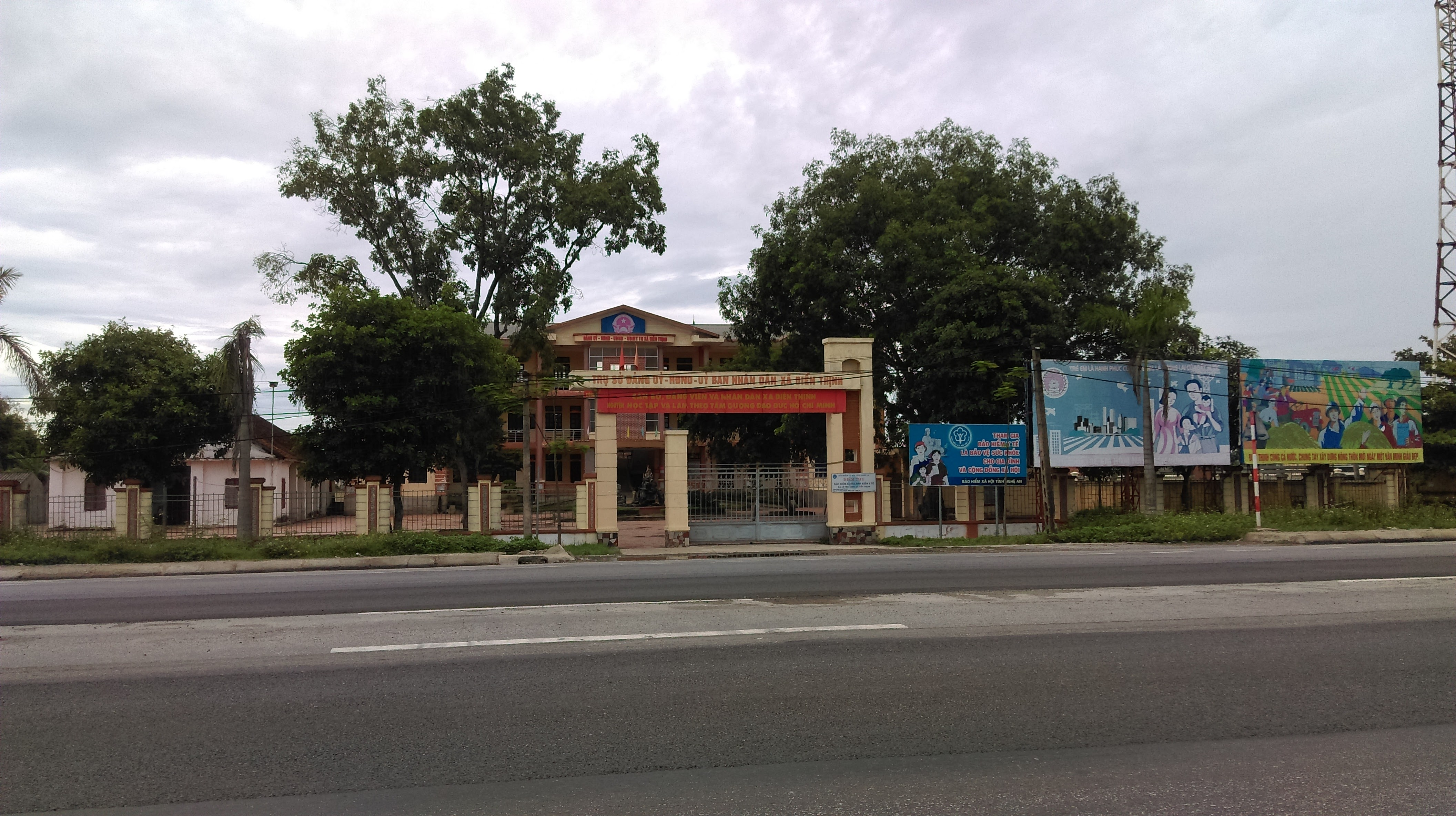 UBND xã Diễn Thịnh, Diễn Châu, Nghệ An